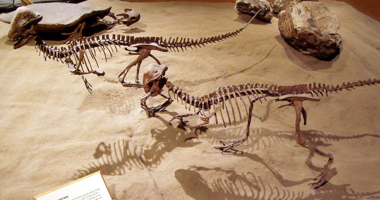 Stegoceras skeletons, Royal Tyrrell Museum, Alberta, Canada.